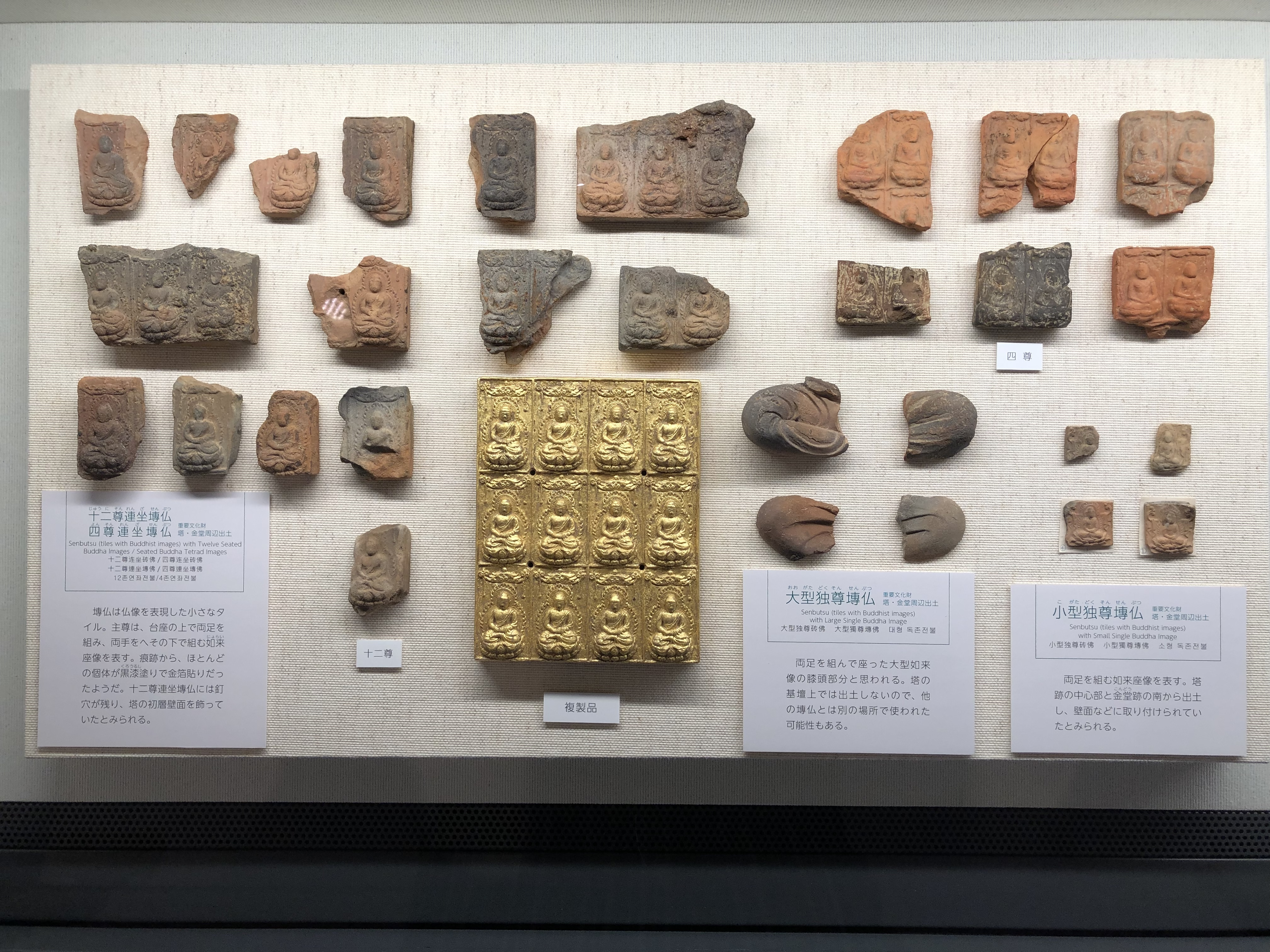 山田寺跡出土品、塼仏 (飛鳥資料館展示)